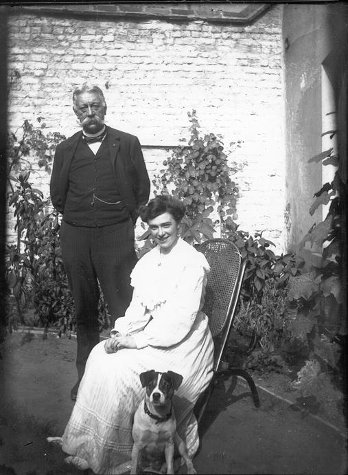 le général Charles ROUEN, époux de José STRAATMAN, avec sa nièce Louise van Dievoet. Joséphine (José) Pétronelle STRAATMAN, née le 15 avril 1842, épousa à Bruxelles le 30 avril 1862 Charles Auguste Jean Baptiste ROUEN, lieutenant-général des grenadiers et historien militaire, né à Anvers le 9 juillet 1838, auteur d’un livre réputé: L’Armée Belge. Exposé historique de son organisation, de ses costumes et uniformes, de son armement et de sa tactique depuis les temps primitifs jusqu’à nos jours, Bruxelles, Lyon-Claesen, 1896, fils de Guillaume, capitaine au 6ème régiment de ligne, ancien cadet aux hussards de Croy, et d’Henriette Elius.